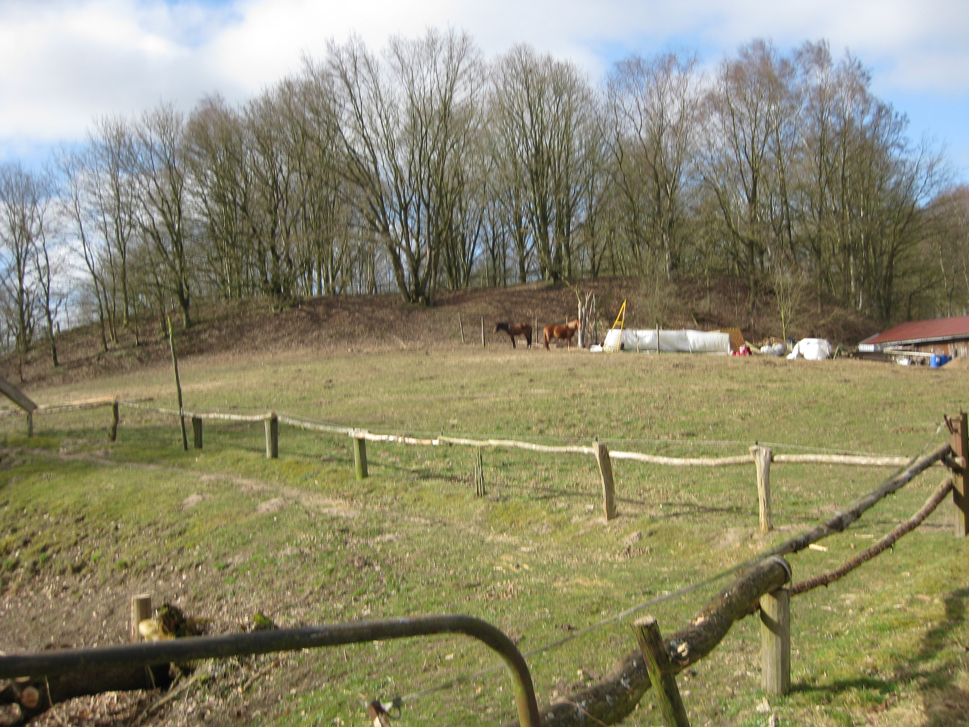 Slawische Höhenburg in Lockwisch im Landkreis Nordwestmecklenburg.Nur schade das sie da nicht ist.